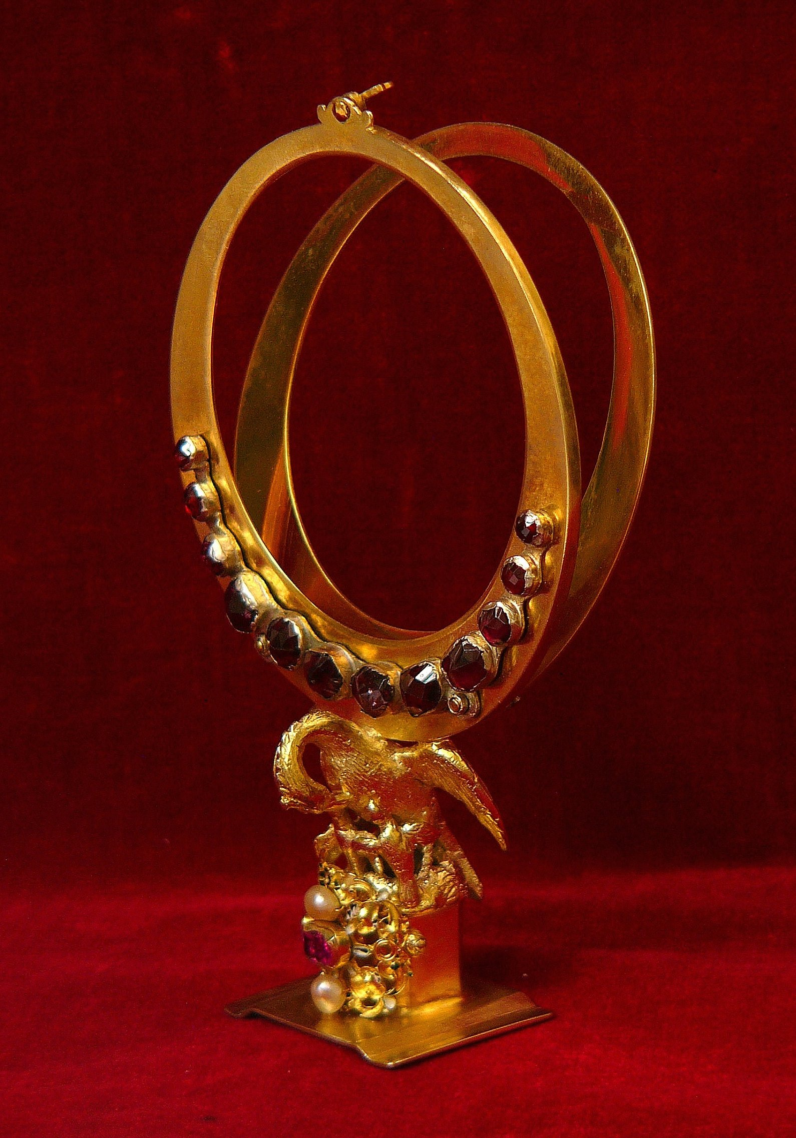 Lunula - lat.: kleiner Mond; eine Halterung für konsekrierte Hostie.